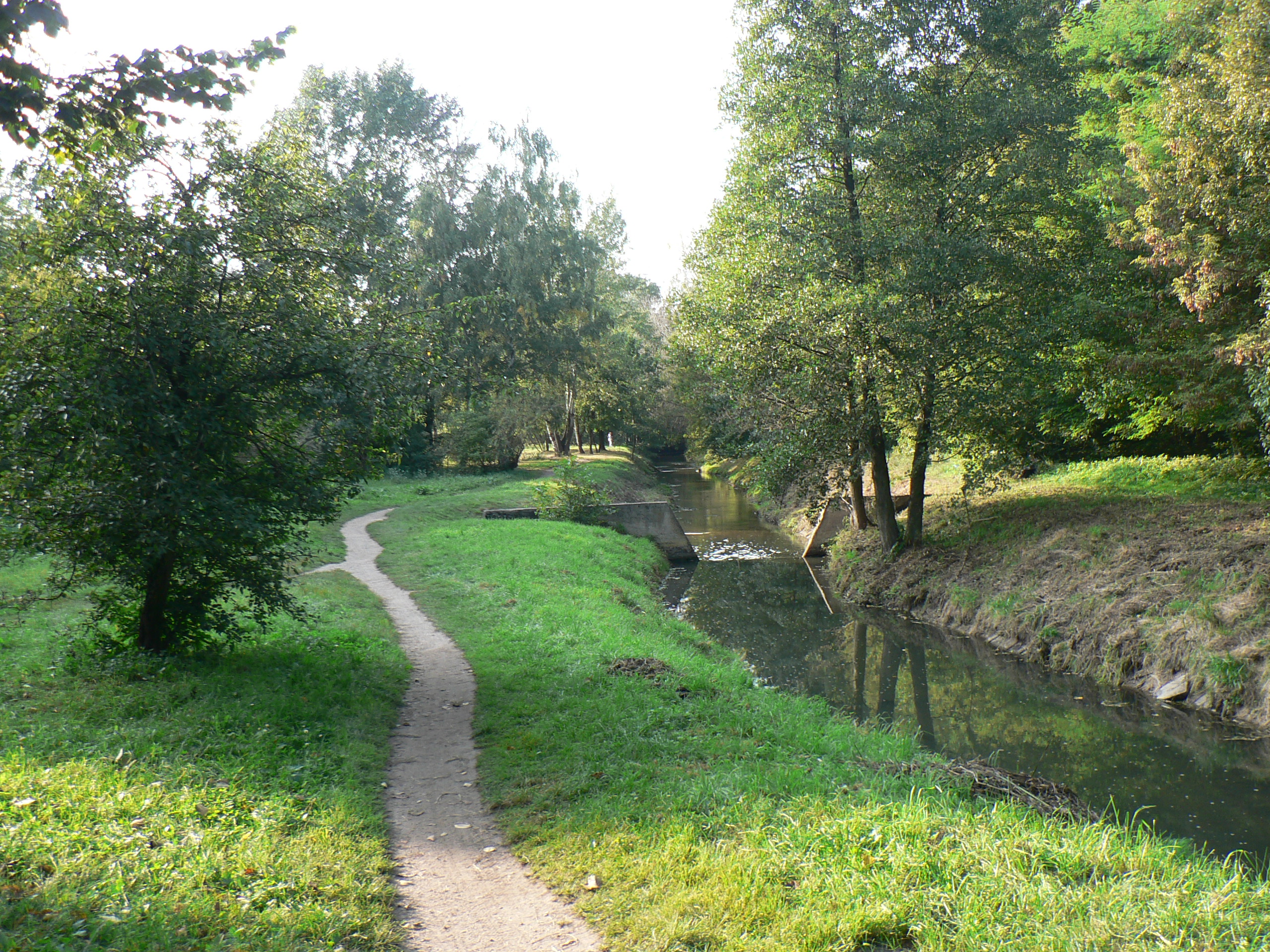 Utrata w Pruszkowie